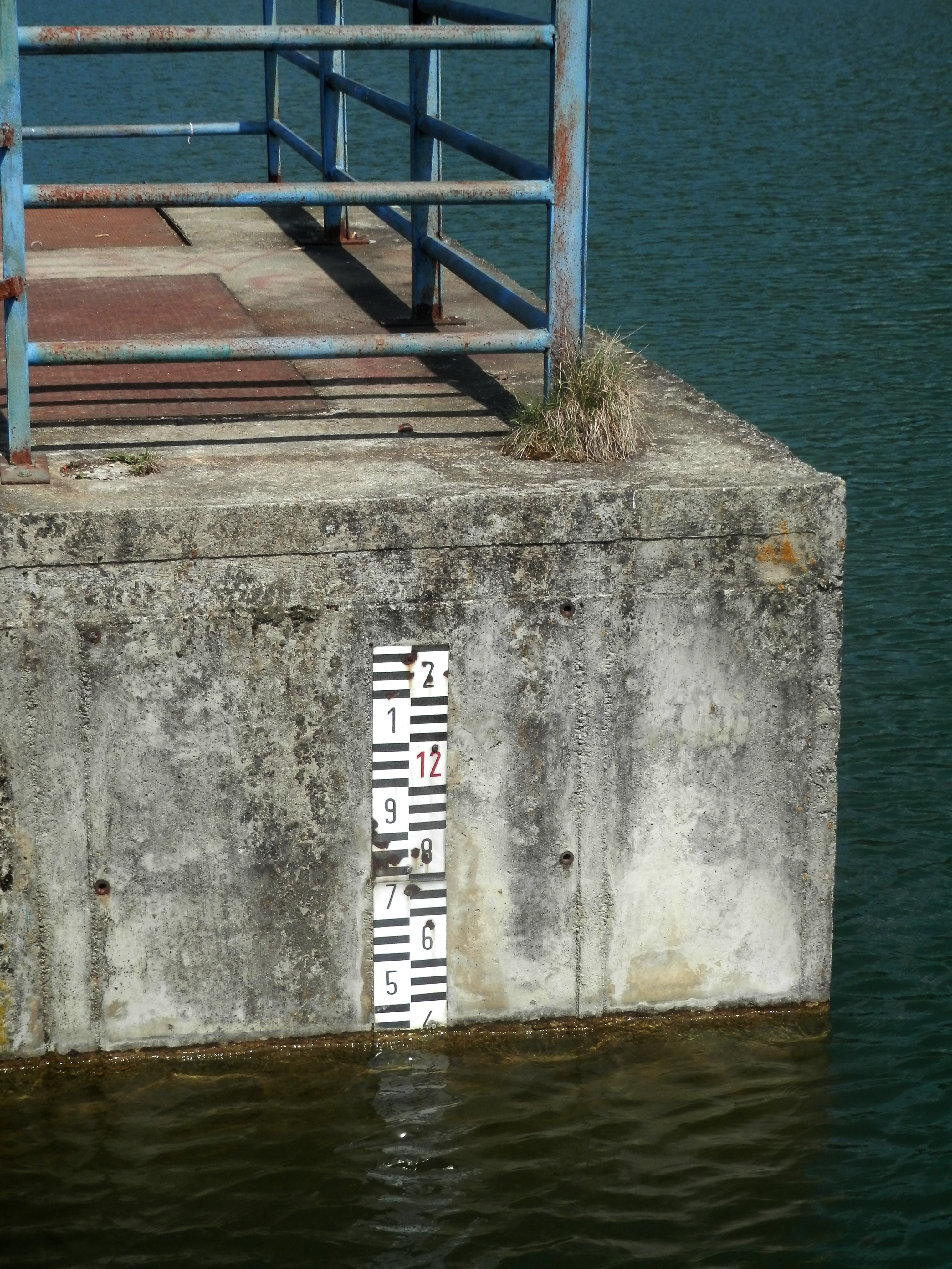 Vodostav. Potok Telek prehradila v roku 1995 hrádza, ktorá vytvorila vodnú nádrž. Tá sa rozprestiera na katastrálnych územiach obce Drienica a Jakubovany. Celková plocha je 2,11 ha. Hĺbka vody pri vodostave 11 až 12 metrov. K vodnej ploche sa dostanete z obce Jakubovany peši, na bicykli alebo autom. Prístupová poľná cesta je v zlom technickom stave a nie je ani dobre vyznačená. Jej dĺžka je asi 2 kilometre. Okres Sabinov. Slovensko.